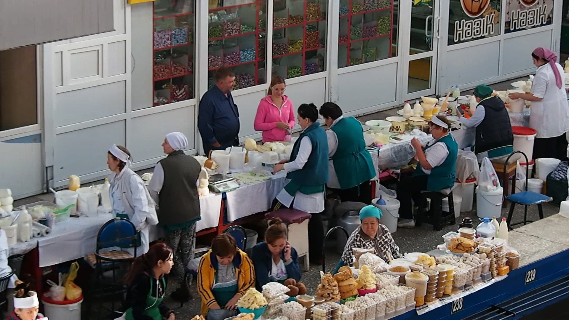 P9240974 134